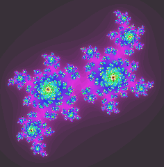 Множество Жюлиа́. Фрактал Жюлиа.